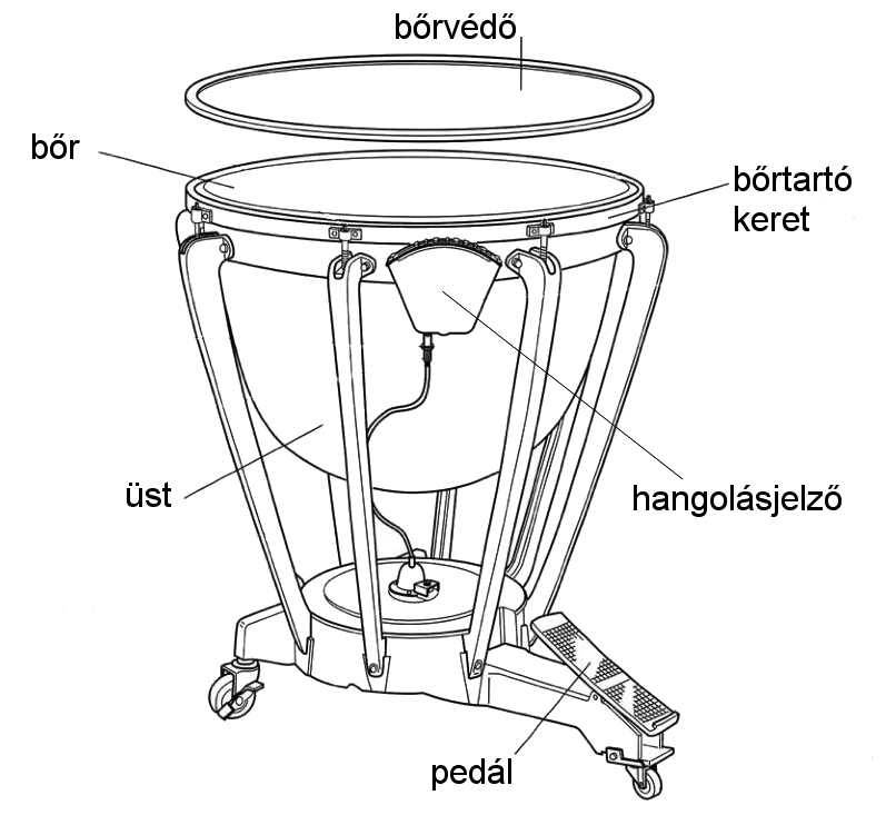 Üstdob